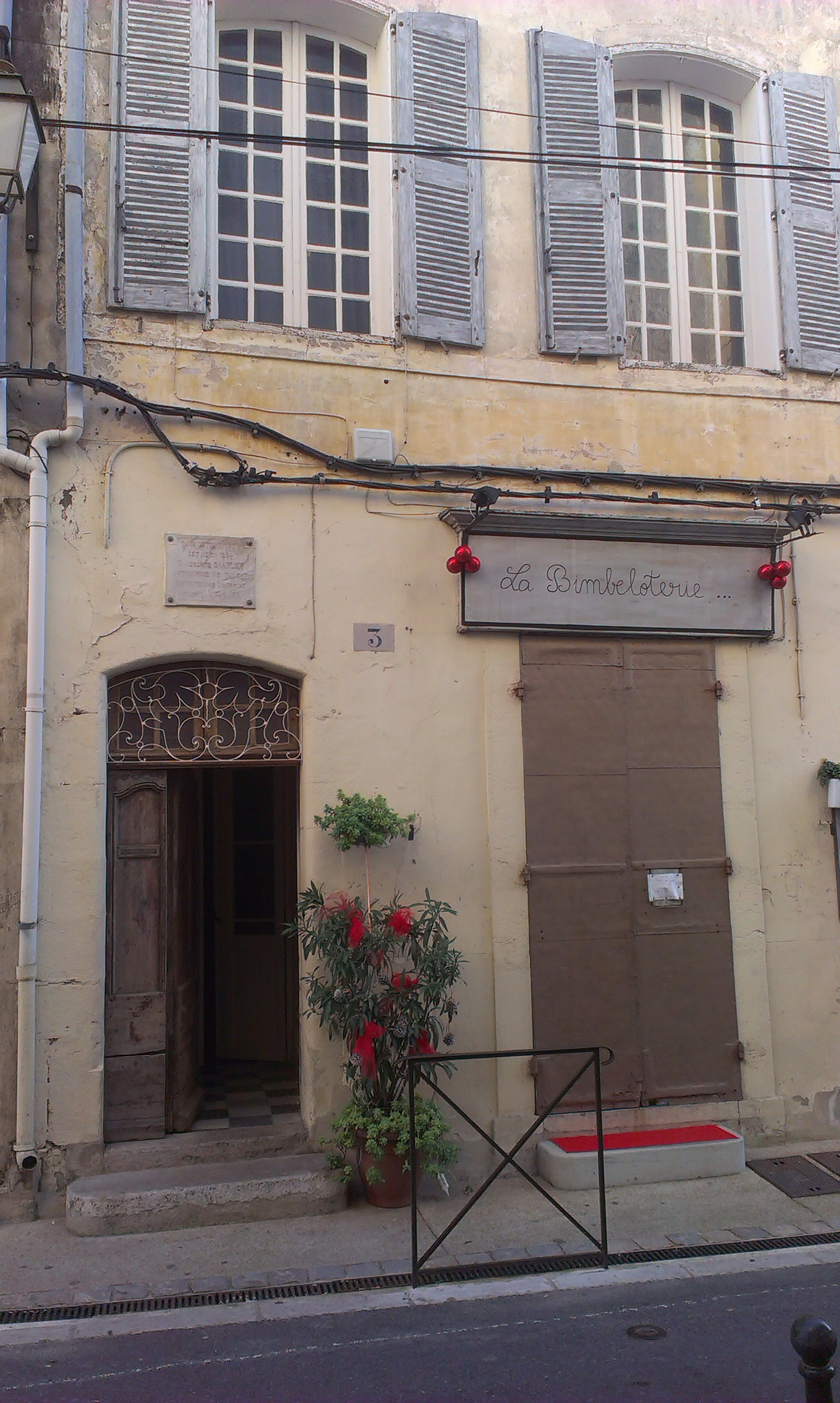 Maison natale d'Auguste Charlois à La Cadière-d'Azur (Var)